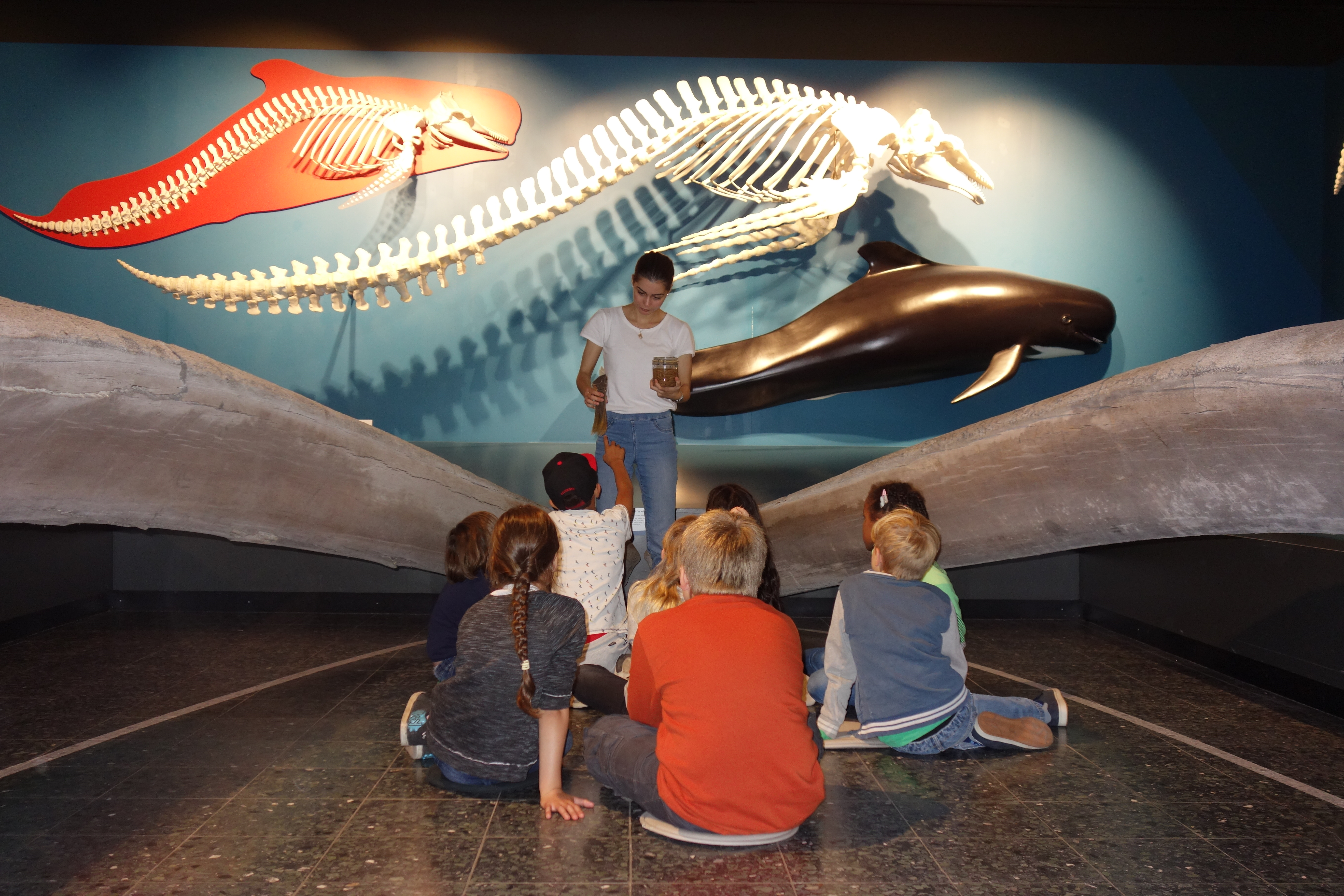 Kindergruppe im Zoologischen Museum Hamburg